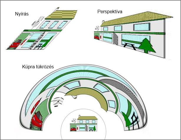 Geometriai transzformáció 2D-ben: kollineáris és anamorf transzformáció